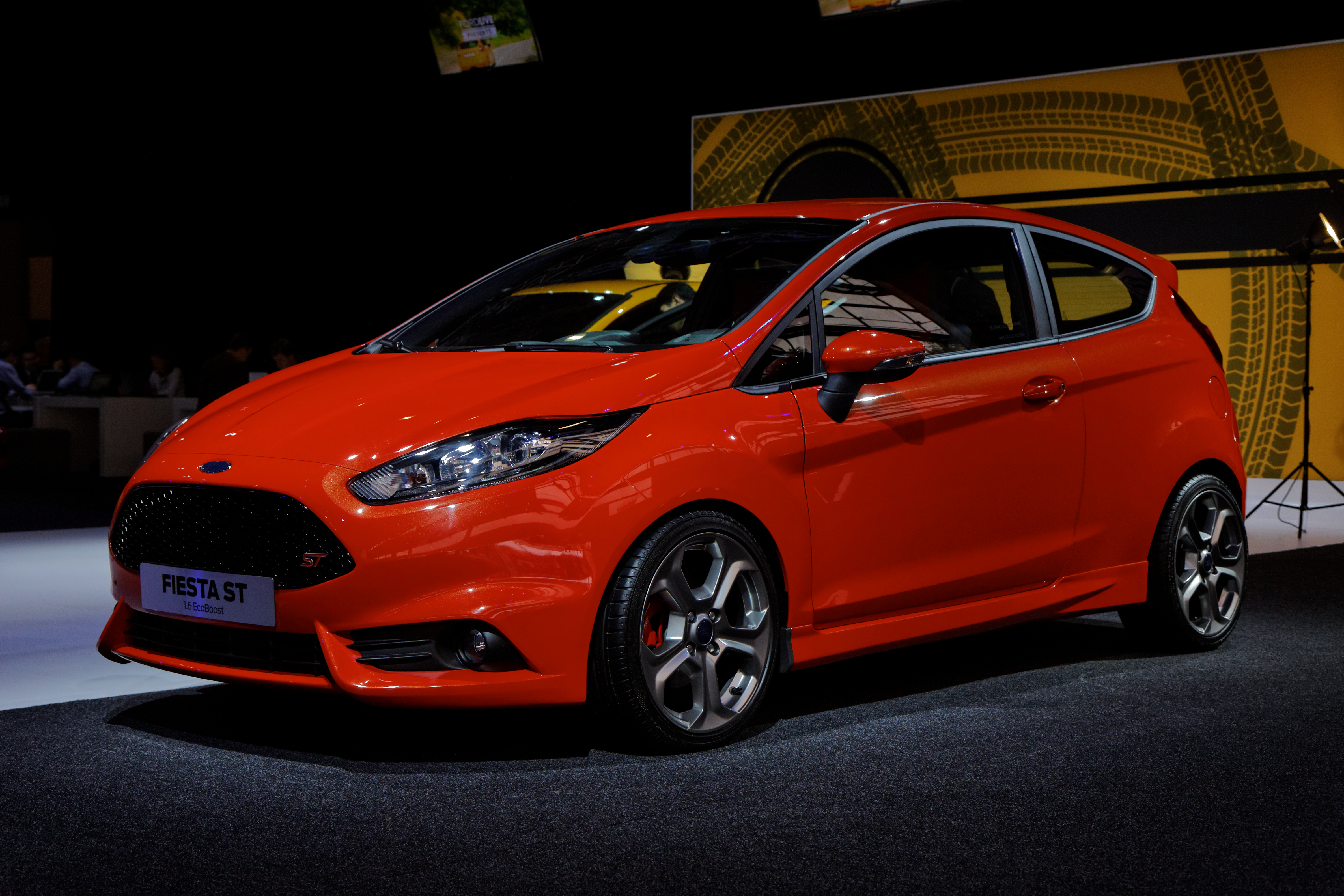 Une Ford Fiesta présentée lors du Mondial de l'Automobile de Paris 2012.